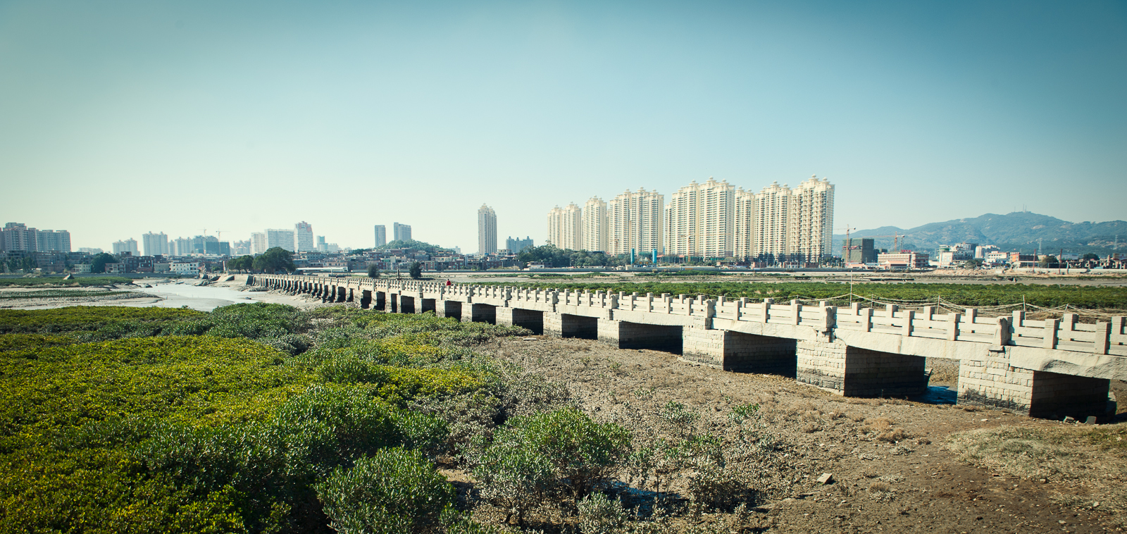 Quanzhou 1053-1059, Song Dynasty